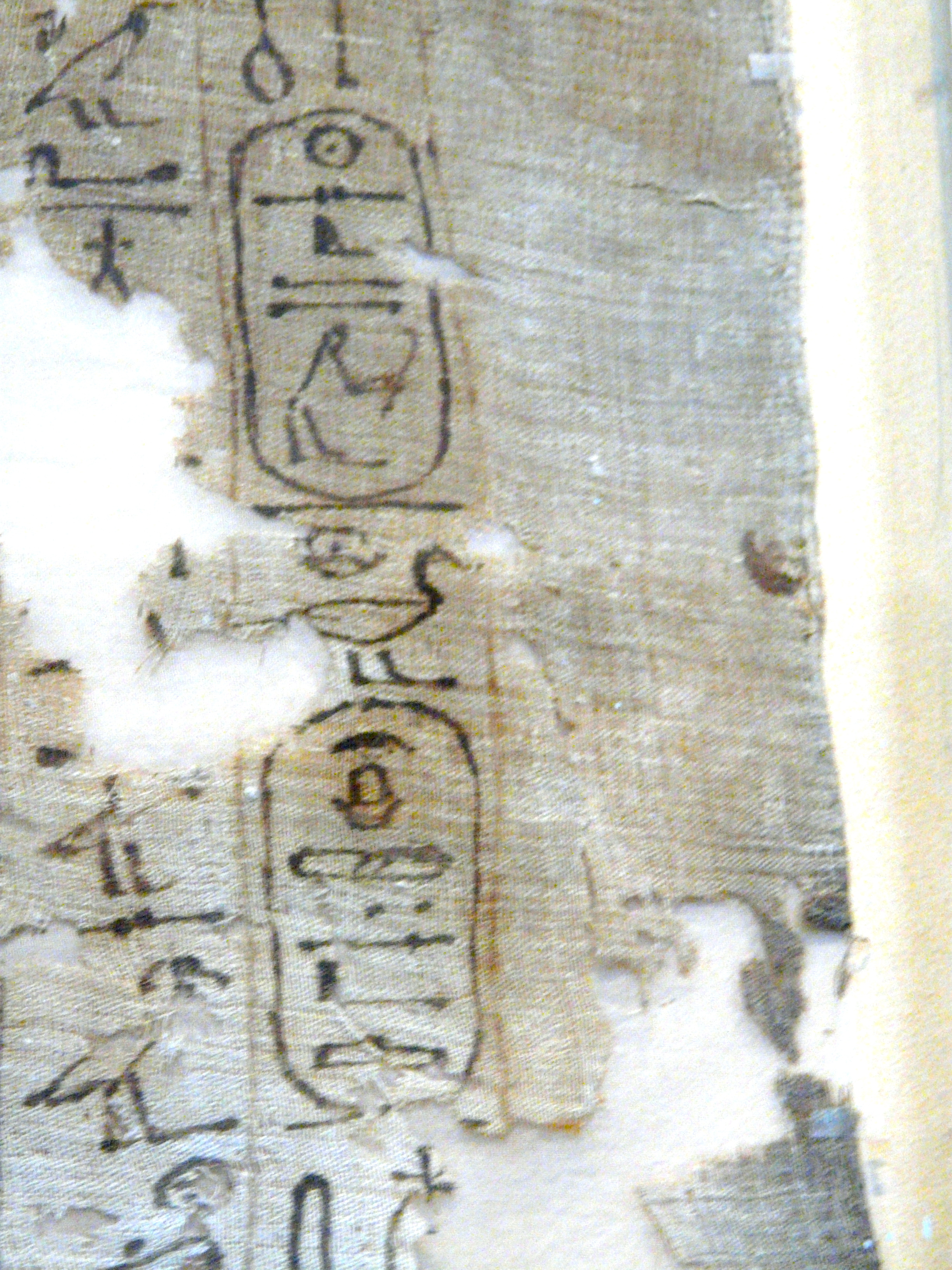 Fragment de linceul funéraire de la princesse Iâhmès (XVIIe dynastie égyptienne), détail de la titulature de son père, le roi Séqénenrê Taâ - Museo egizio (Turin)